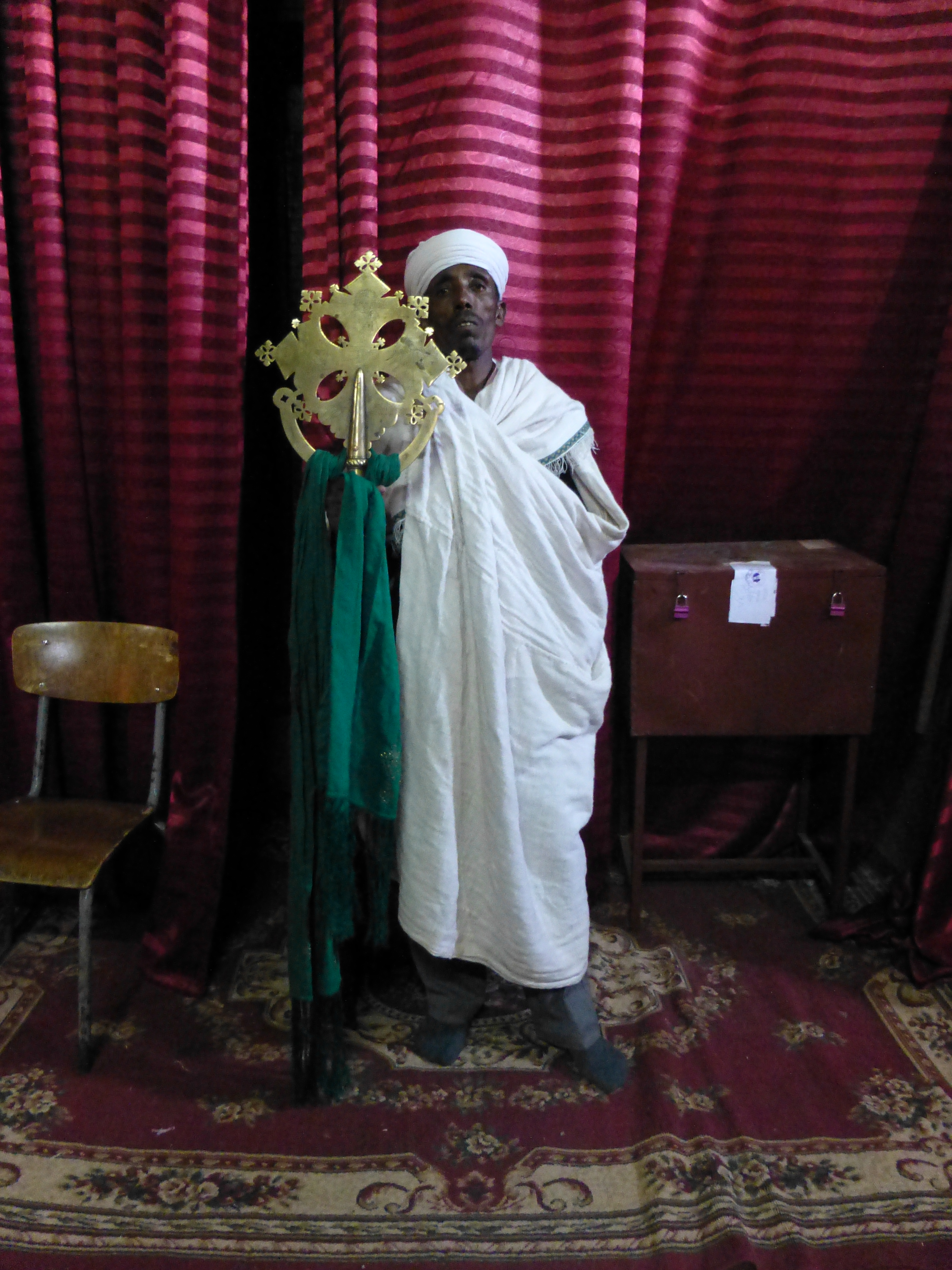 Prêtre orthodoxe et croix de procession dans une église de Lalibela (Ethiopie)